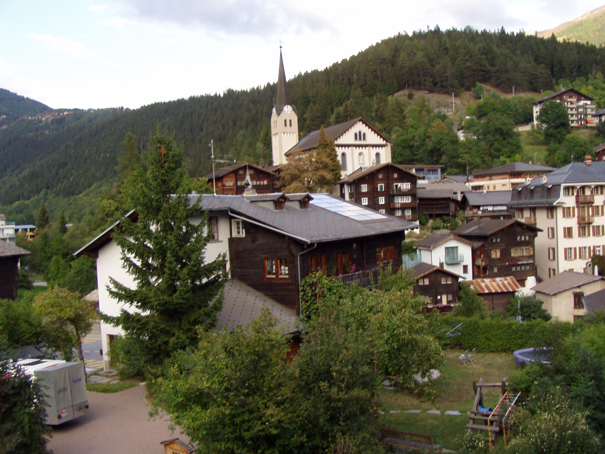 Fiesch - kostel